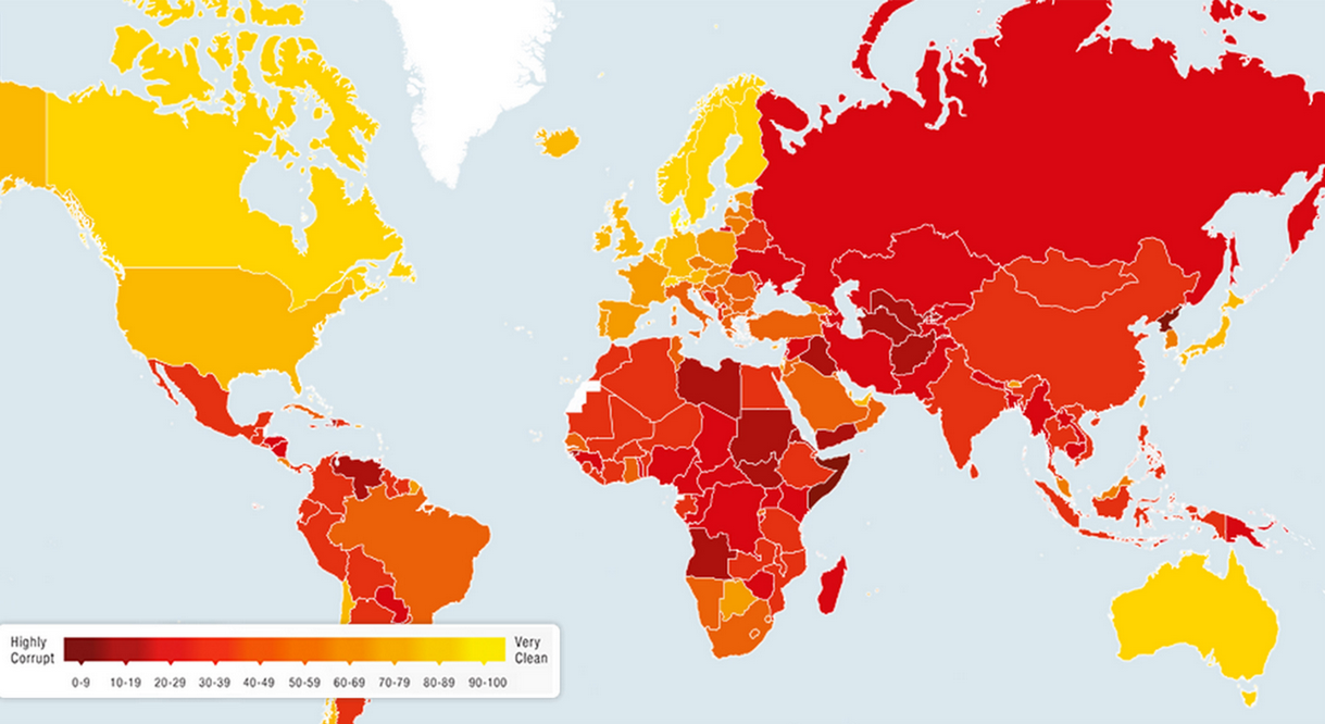 Index de corruption mondial en 2014 selon Transparency International